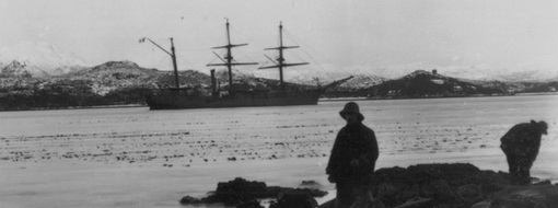 Le trois-mats barque La Romanche de la marine nationale française dans la baie Orange, sur l'île Hoste lors de la mission scientifique française du cap Horn (1882-1883).